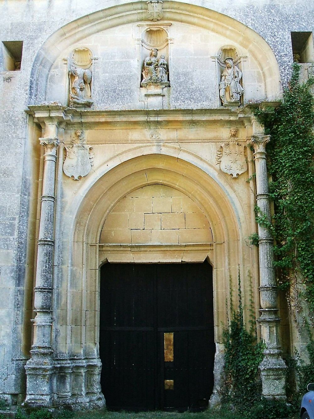 Real Monasterio de Santa María de Fresdelval (Burgos)